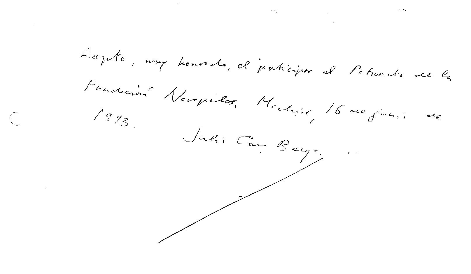 Carta manuscrita Julio Caro Baroja patronato Navapalos